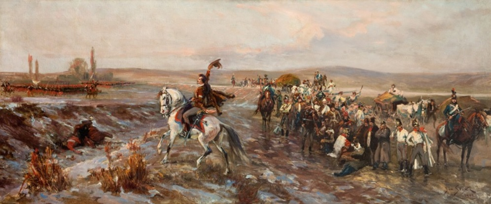 Petőfi alakja az Erdélyi panoráma egyik megtalált részletén Az Erdélyi Panoráma története Az Erdélyi Panoráma megszületésének előzménye a Wojciech Kossak és Jan Styka vezetésével megfestett lengyel körkép, a „Racławicei Panoráma”, melyet 1896-ban mutattak be a magyar közönség számára Budapesten. A nagy sikerre való tekintettel a magyar kormány 1898-ra (az 1848-as szabadságharc 50. évfordulója alkalmából) körképet rendelt Jan Styka festőművésztől. A 15 méter széles és 120 méter kerületű körkép Jan Styka vezetésével került megfestésre, olyan magyar művészek közreműködésével, mint Vágó Pál, a csatajelenetek kitűnő festője, Spányi Béla, a neves tájképfestő és Margitay Tihamér. A körkép öt hónapos munkát vett igénybe. A Bem-Petőfi Körkép központi témája az 1849. március 11-én vívott nagyszebeni csata, ahol a magyar honvédsereg Bem József lengyel tábornok vezényletével, bravúros hadművelettel győzelmet aratott az egyesült osztrák és orosz haderő felett. A körkép a döntő pillanatot ábrázolja, amikor az öldöklő küzdelemben, az ellenséges túlerő ellenére, a csata fordulópontjához érkezett.